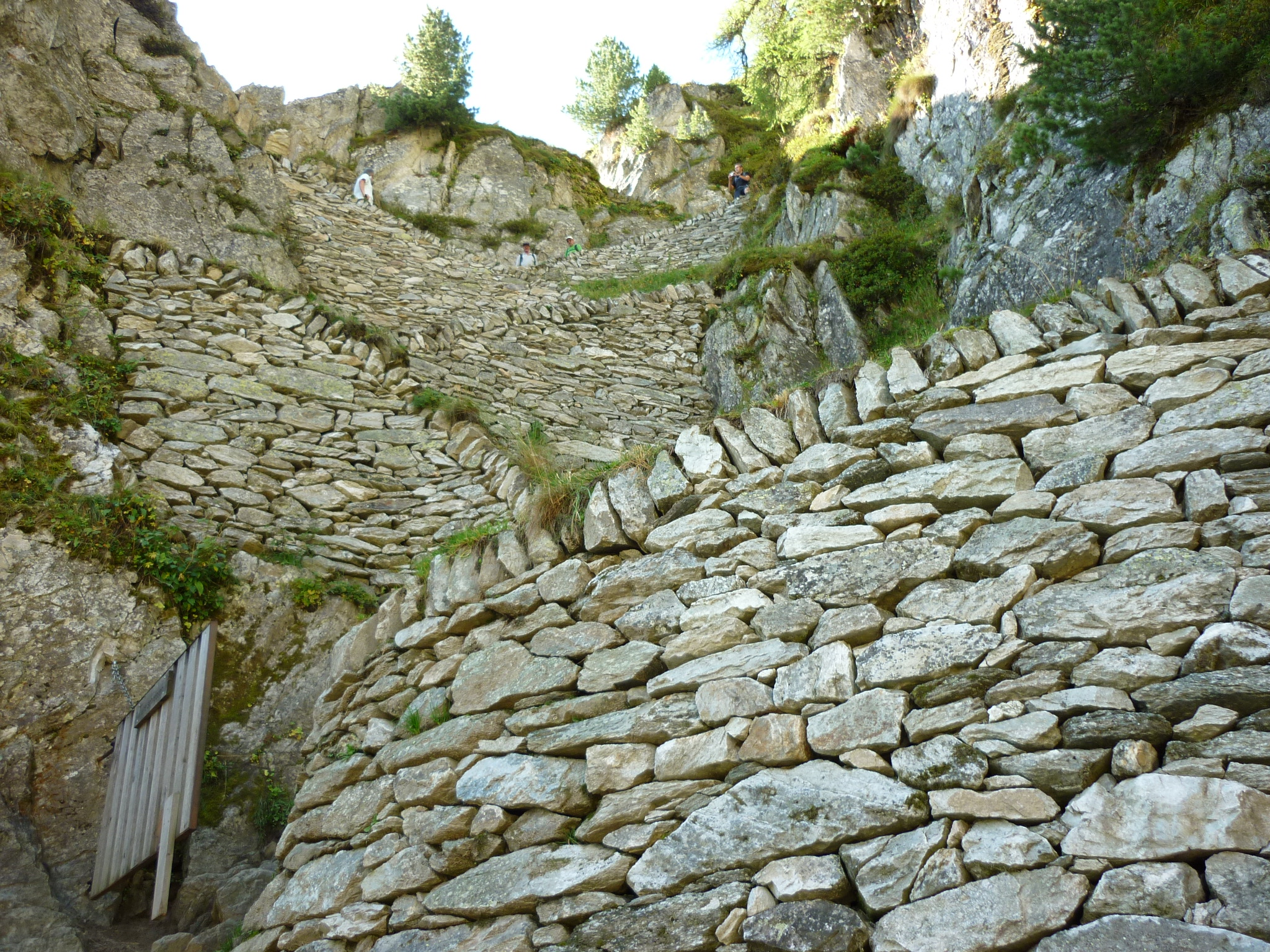 "Steigle", Belalp, Naters VS, Schweiz